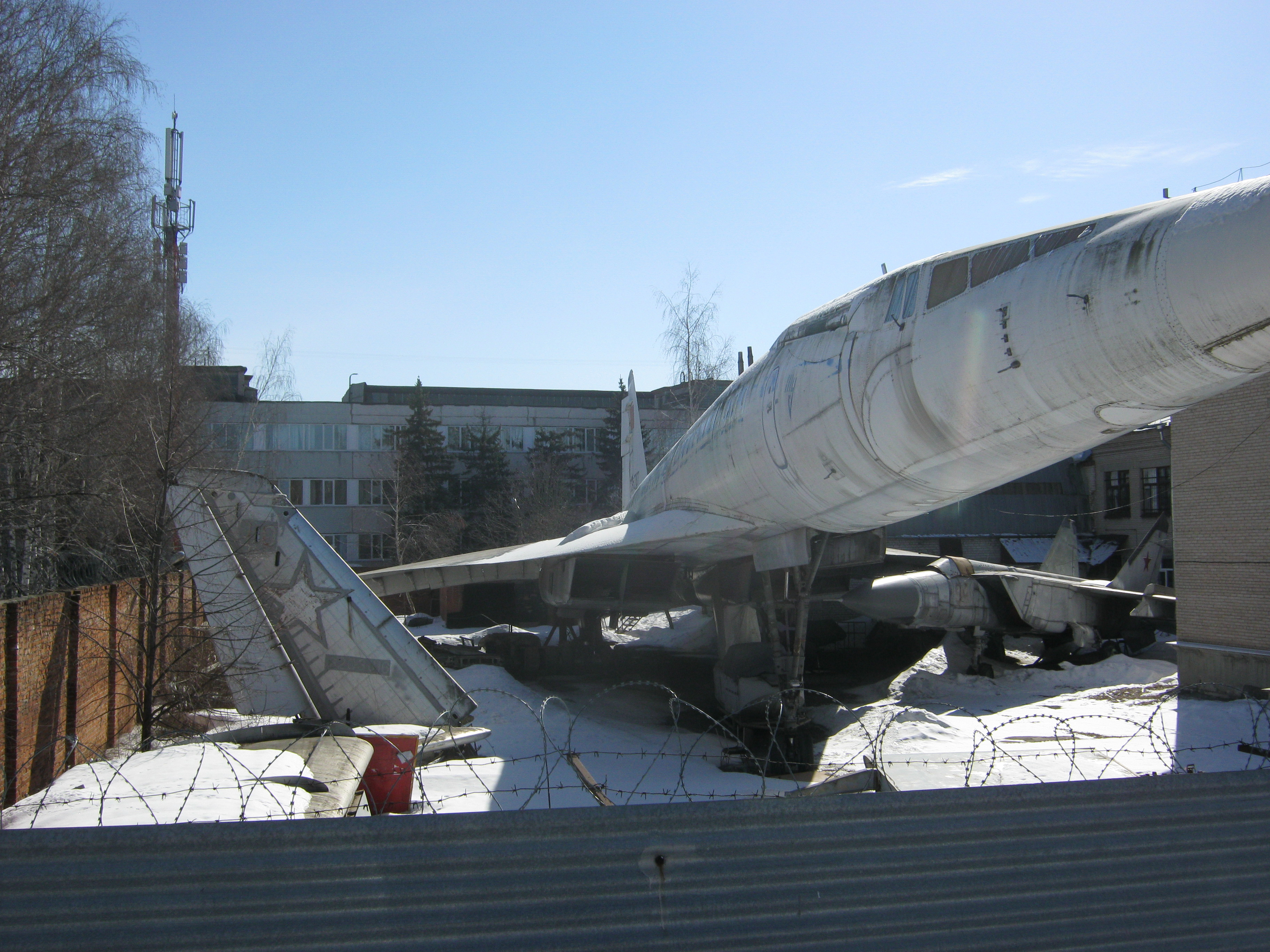 Die Tupolew Tu-144 (Seriennummer 05-1, Modell 004, Kennzeichen SSSR-77107), abgestellt auf einem Grundstück in der Ulitza Dementjeva in Kasan, Russland.